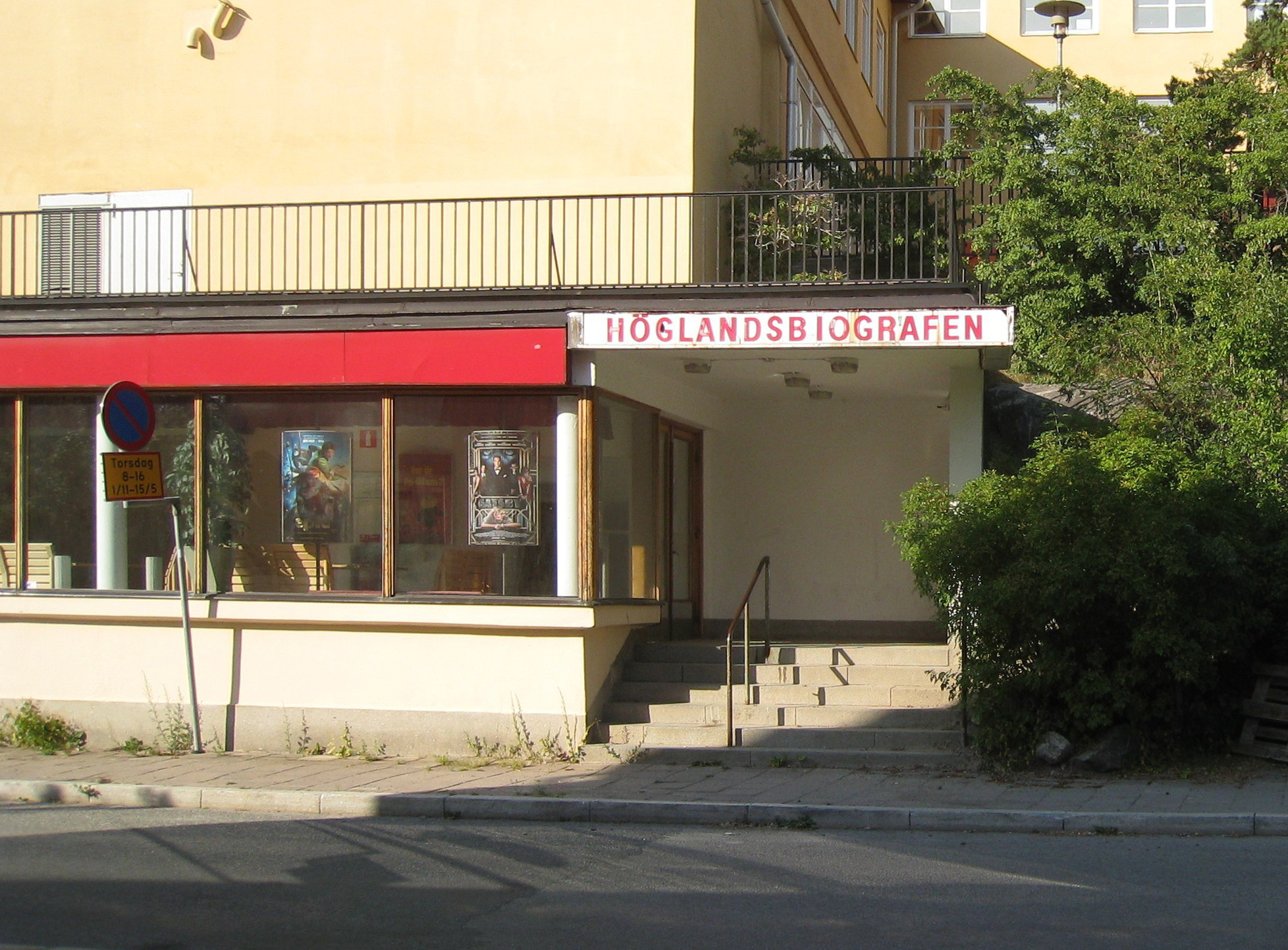 Höglandsbiografen